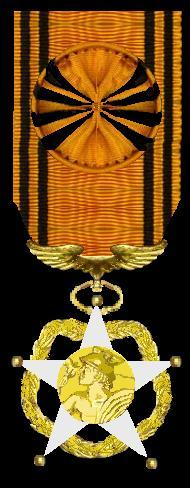 EIGEN TEKENING